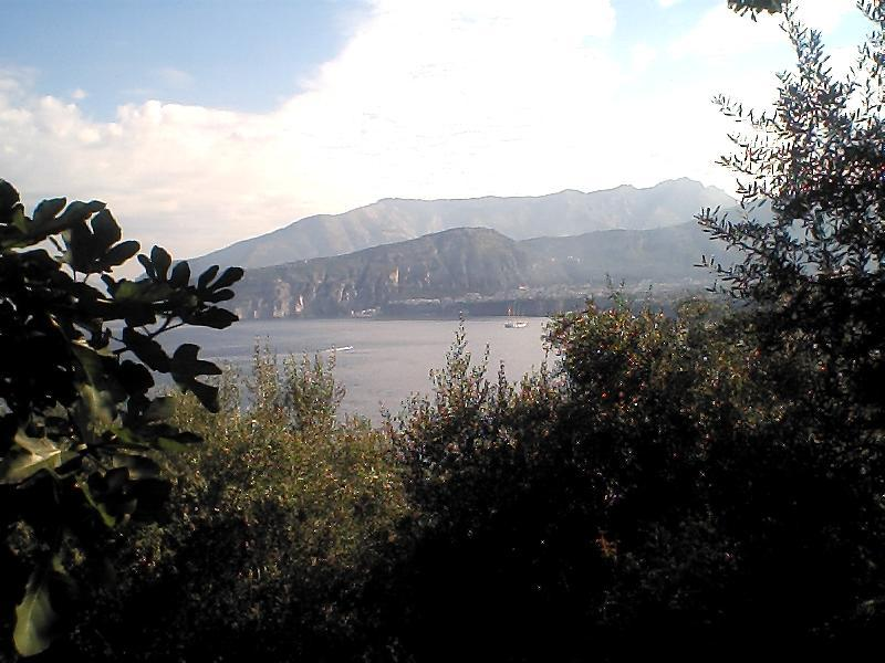 Les falaises et le port de Sorrento vue du Cap de Sorrento.